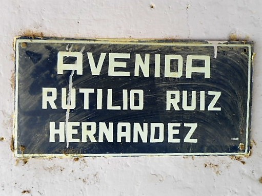 Letrero de la avenida Rutilio Ruiz Hernández, calle principal de San Juan Achiutla, Oaxaca, México